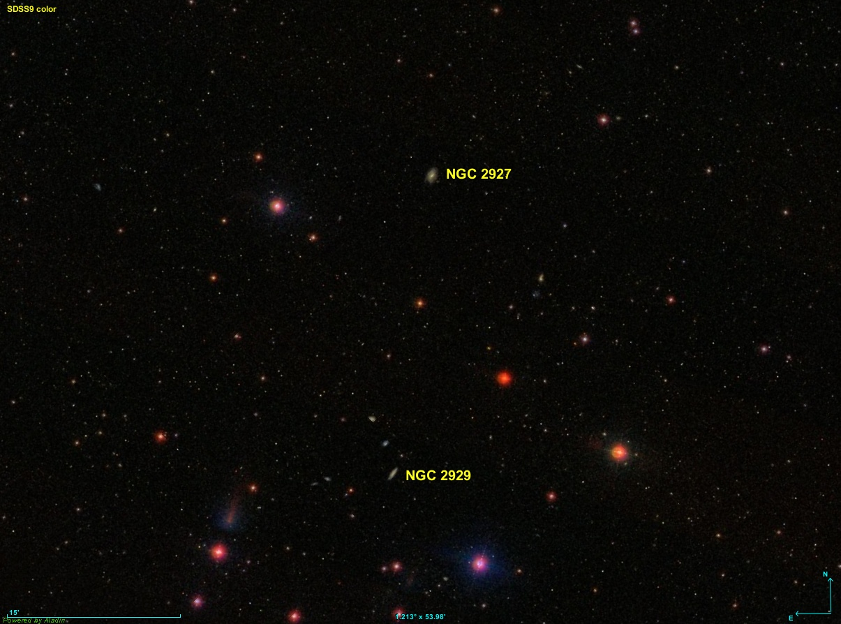 Image créée à l'aide du logiciel Aladin Sky Atlas du Centre de Données astronomiques de Strasbourg et des données publiques en format FIT de SDSS (Sloan Digital Sky Survey).